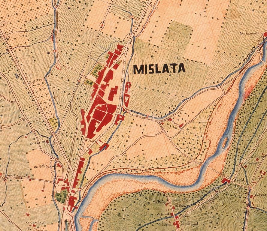 Mislata el 1883 (el nord està a la dreta).